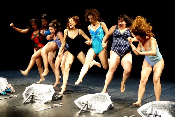 Le spectacle Le sorelle Macaluso d'Emma Dante au gymnase du lycée Mistral lors du Festival d'Avignon 2014